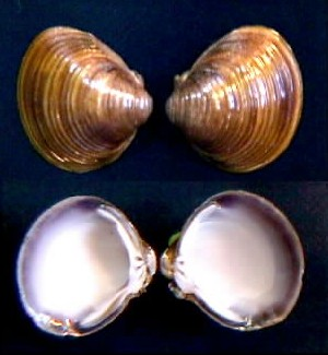 Corbicula fluminalis colectado en Río Caribe, estado Sucre.